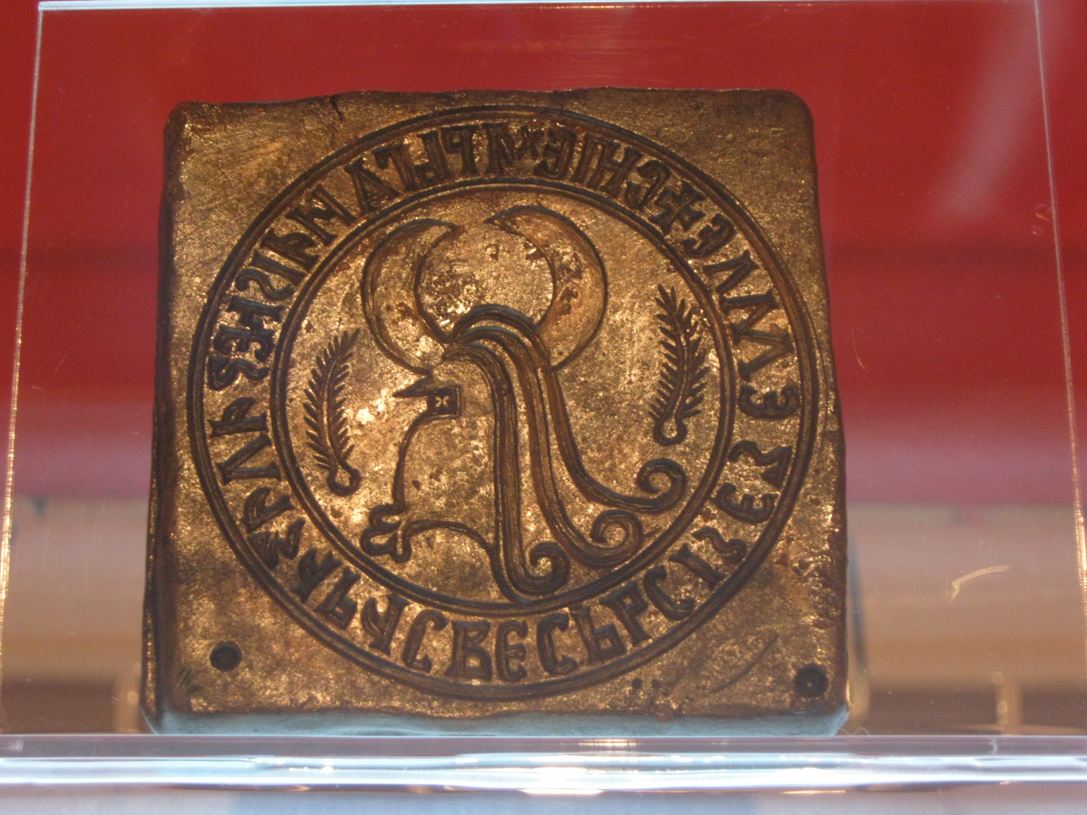 Матрица за печат кнеза Лазара Хребељановића; легура бакра, олова и калаја. На печату је кружни натпис: „Господин кнез Лазар свесрпских земаља“. Печат је пронађен током археолошких истраживања на планини Рудник, на локалитету Дрење (двориште С. Марковића). Први пут приказан је јавности у Музеју рудничко-таковског краја у Горњем Милановцу, у октобру 2015. године.